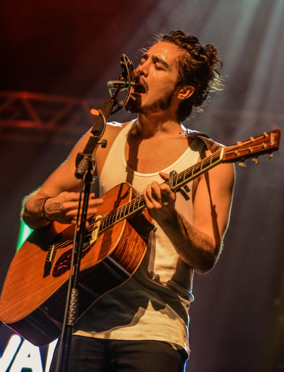 Tiago Iorc em show no festival Nova Brasil FM